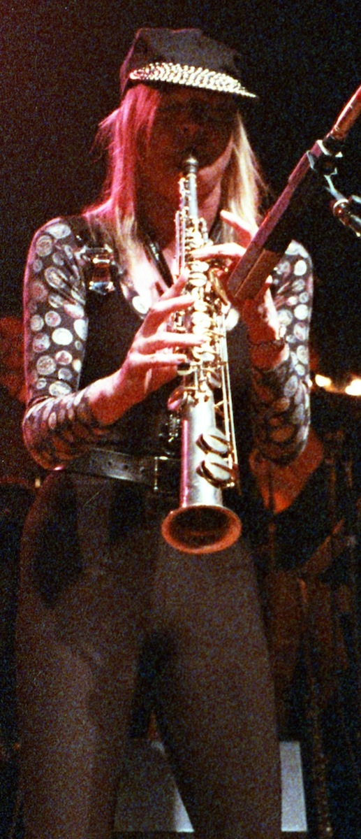 Barbara Thompson (United Jazz + Rock Ensemble), 23.11.1992, Braunschweig, Jolly Joker